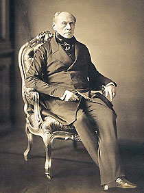 Filipp Brunnov (1797-1875)